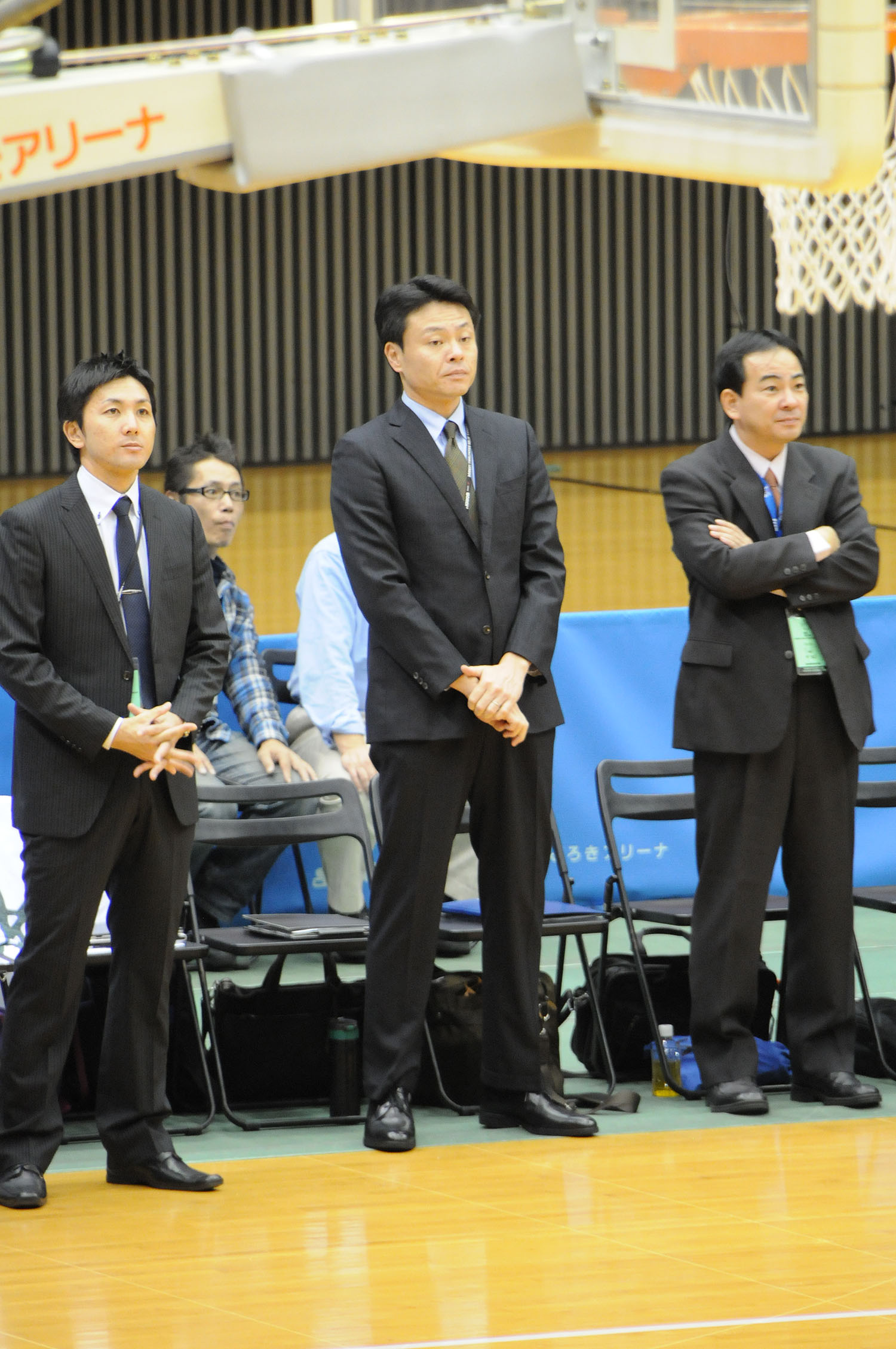 デンソーアイリス、小嶋裕二三ヘッドコーチ。とどろきアリーナで。